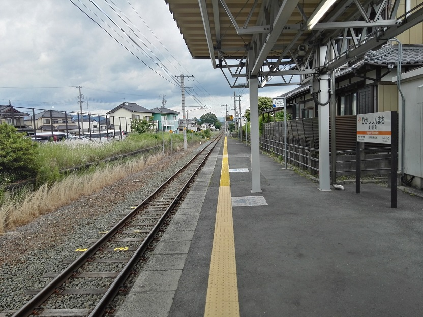 Higashi-Shimmachi station platform